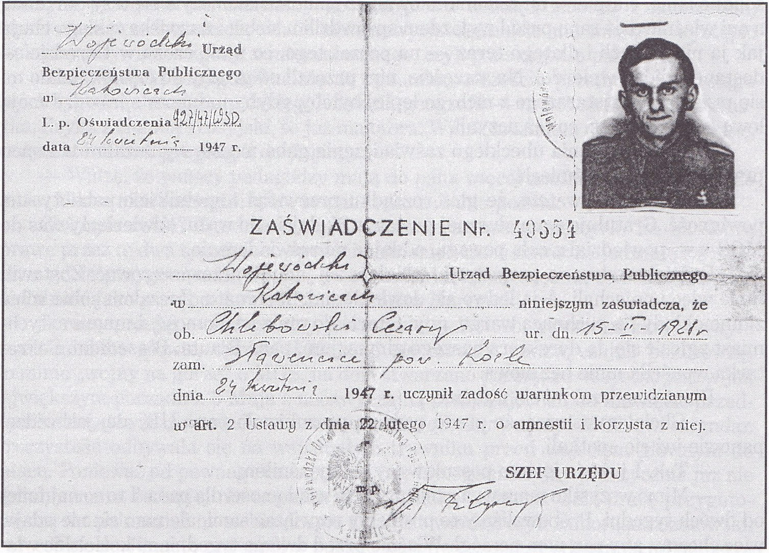 Zaświadcznie wydane przez katowicki UBP o ujawnieniu się Cezarego Chlebowskiego z 24 kwietnia 1947 r.